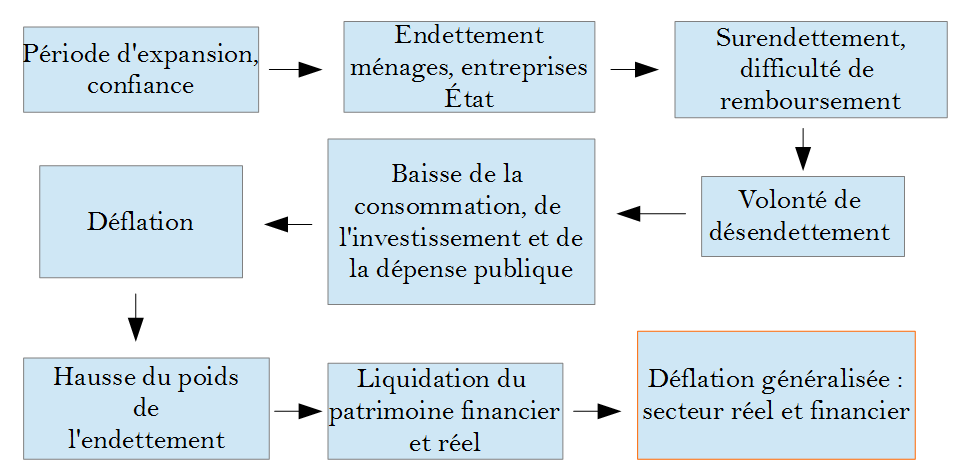 Processus de déflation par la dette